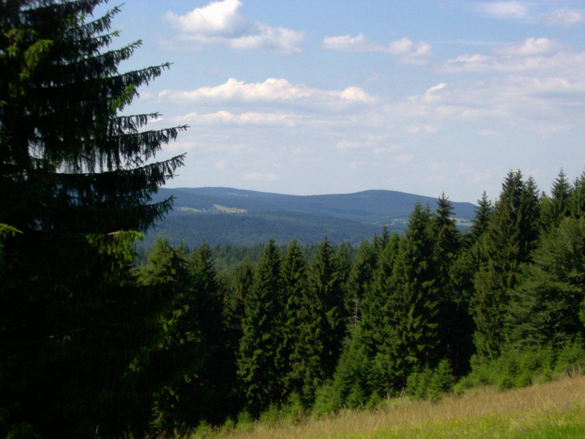 Blick vom Kalten Staudenkopf (768 m) auf den Großen (944 m, halbrechts) und den Kleinen (875 m, rechts) Finsterberg. Halblinks der Schneekopf (978 m) mit seinen Nebengipfeln Teufelskreise (967 m, davor) mit Schmücke (knapp unterhalb, Wiese) und Fichtenkopf (944 m, links davon). Die Wiese darunter liegt am Fuße des Großen Eisenberges (907 m, nach links verdeckt). Im mittleren Vordergrund der Volkmarskopf (726 m).